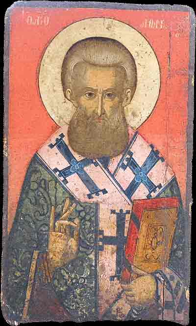 Св. Атанасиј во црквата Св. Ѓорѓија во Струга, Македонија